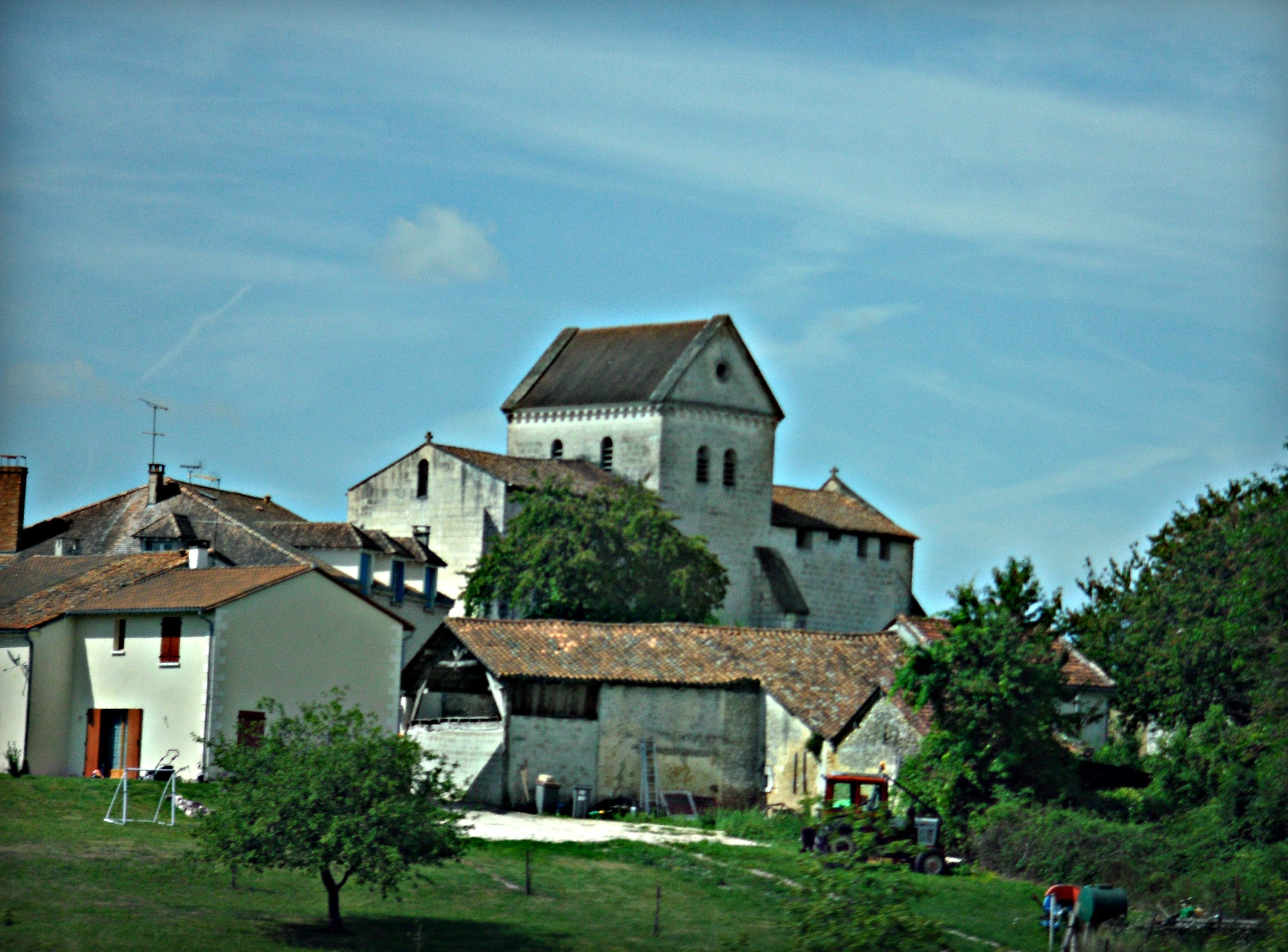 L'église Notre-Dame de La Nativité de Monsec